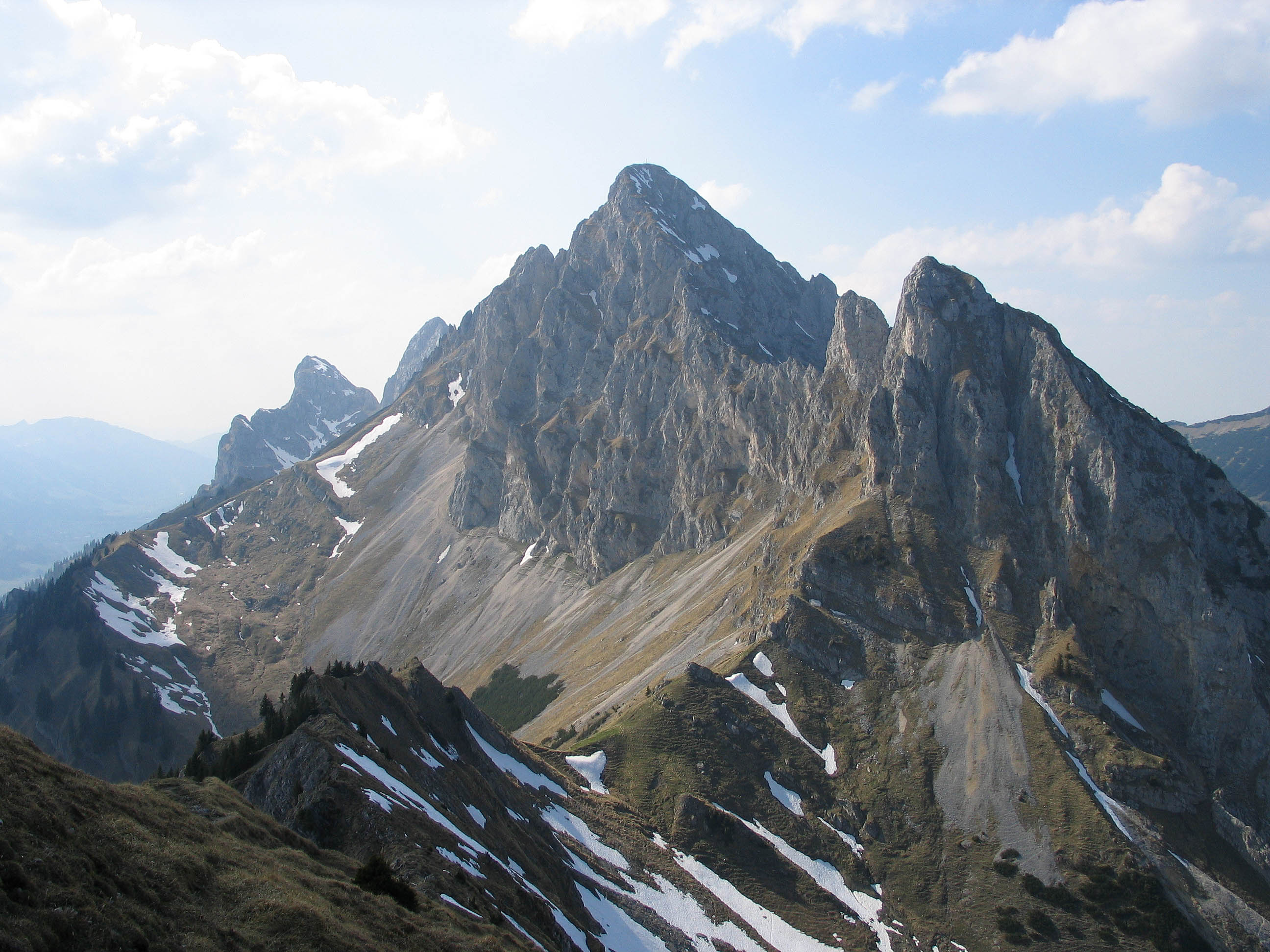 Kellespitze (2238 m) von der Schneid (2009 m), Tannheimer Berge, Tirol